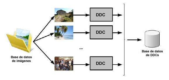 Esquema de desarrollo de una aplicación para buscar coincidencias entre imagenes a partir de sus DDC (Descriptores de la Distribución del Color)